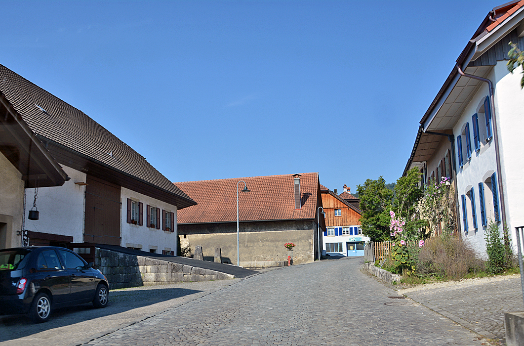 Das Dorf Orvin im Kanton Bern